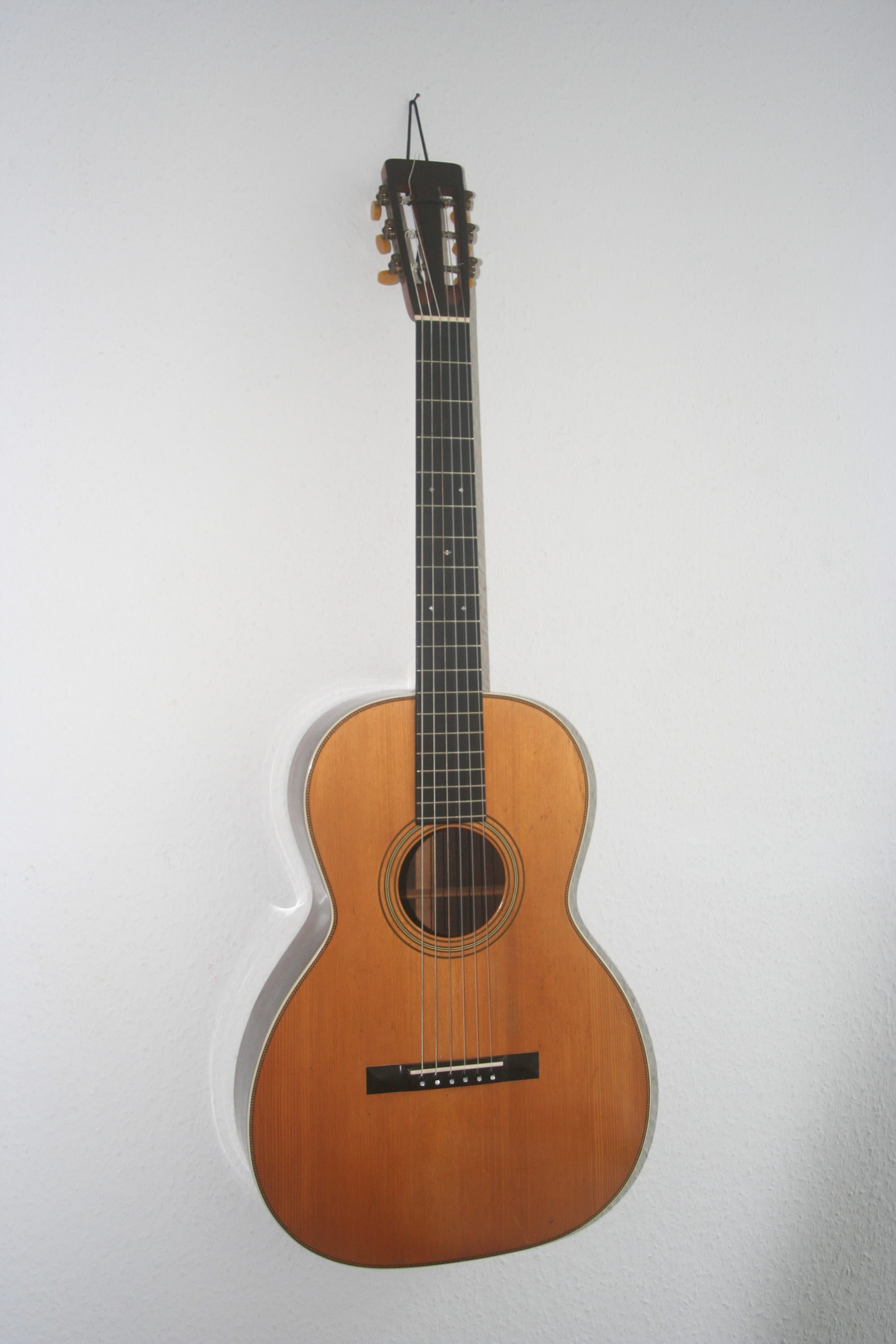 Martin 00-28 1907 Nylon Saiten